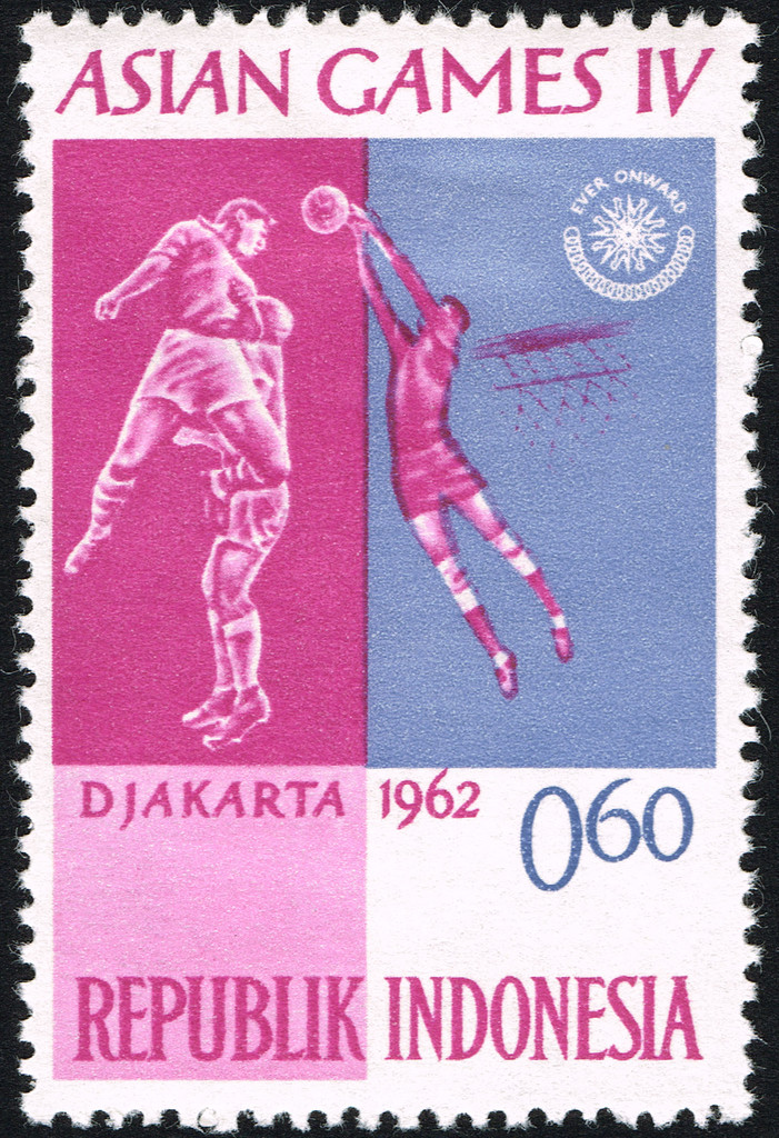 Asian Games IV